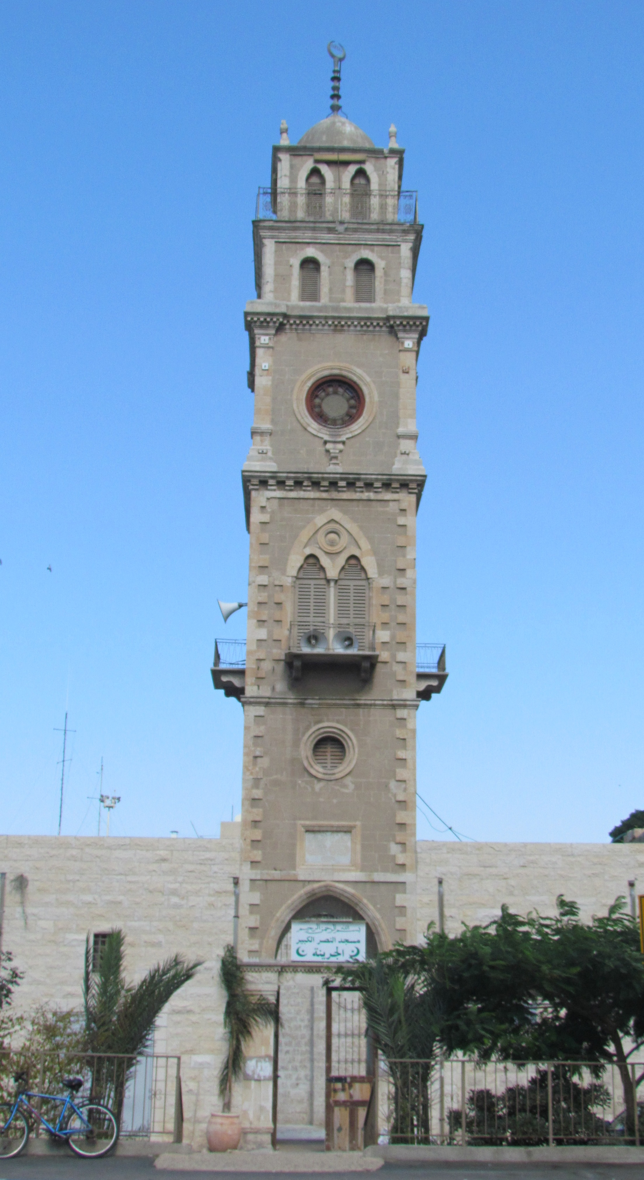 מסגד אל-ג'רינה בחיפה